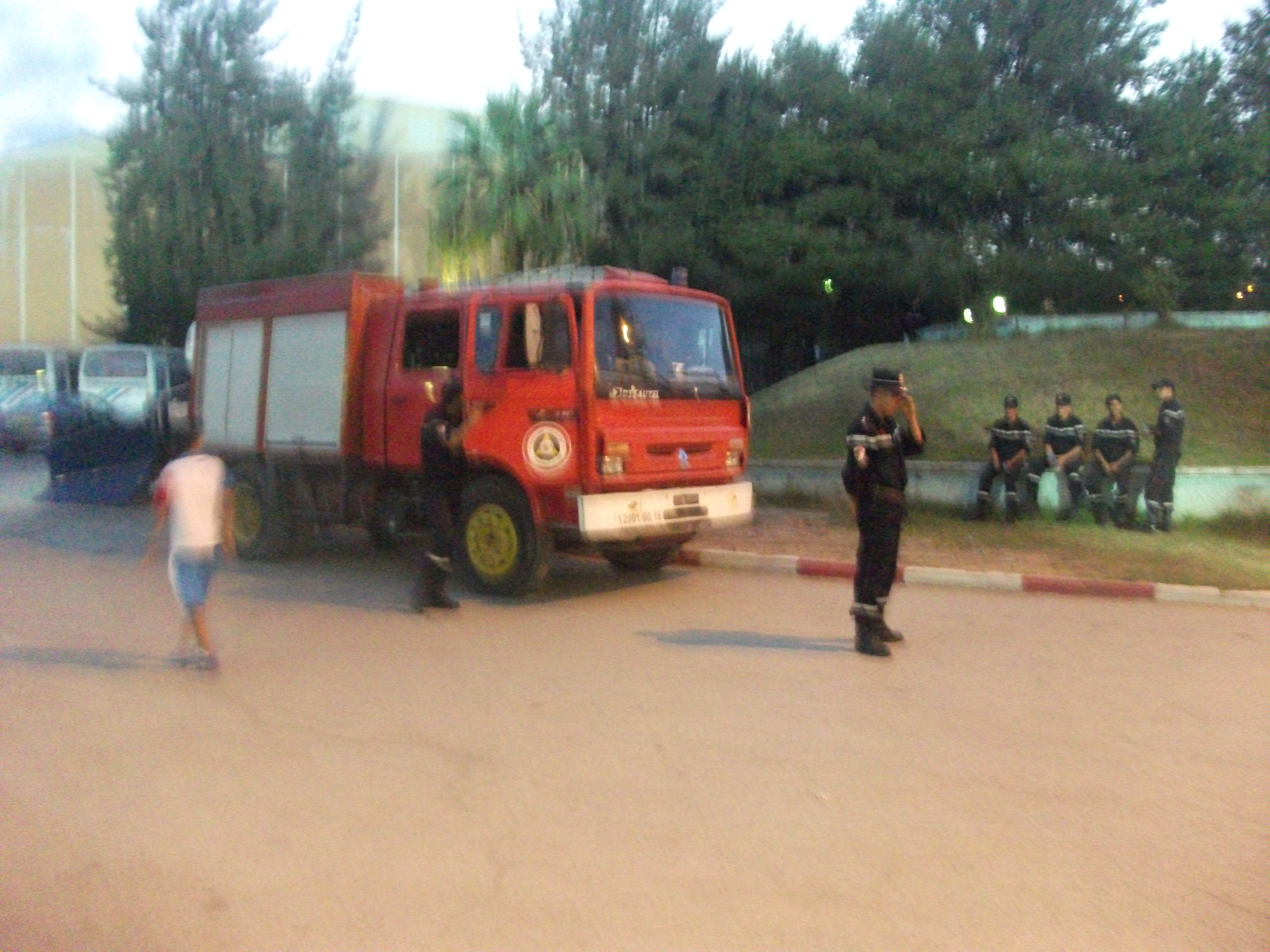 Véhicule et pompiers de la protection civile